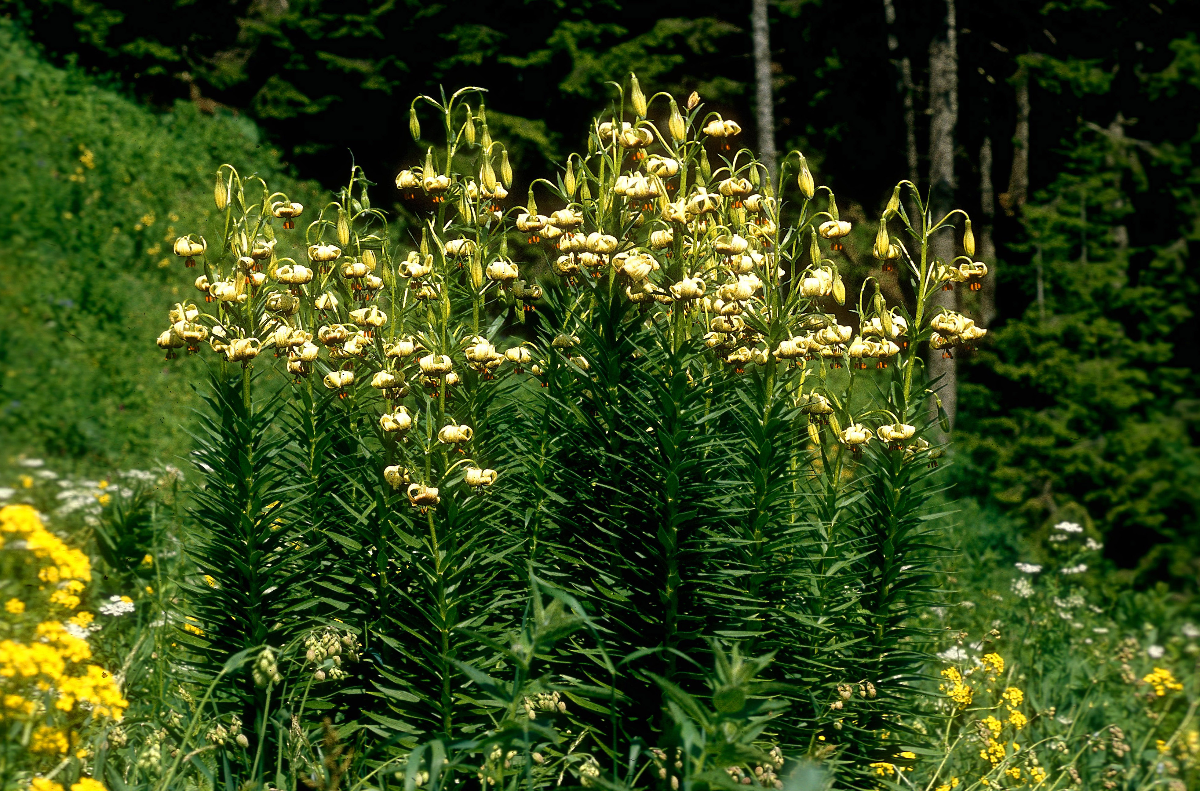 Lilium ciliatum in habitat at Zigana Pass, Turkey